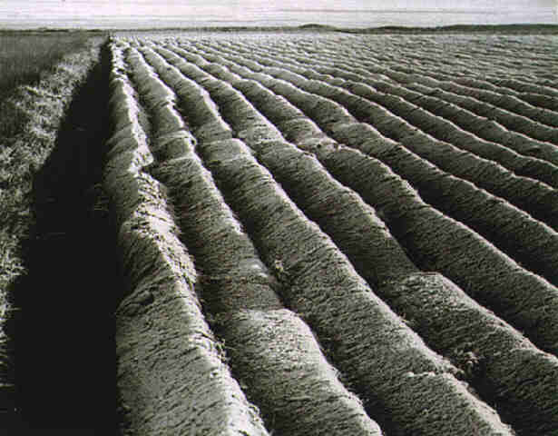 Abbildung stellvertretend Räder schwarz und weiß. Durch Erbschaft erhalten. 1950er Jahre. Auf Arvid Gutschow. Mein Großvater zurück.